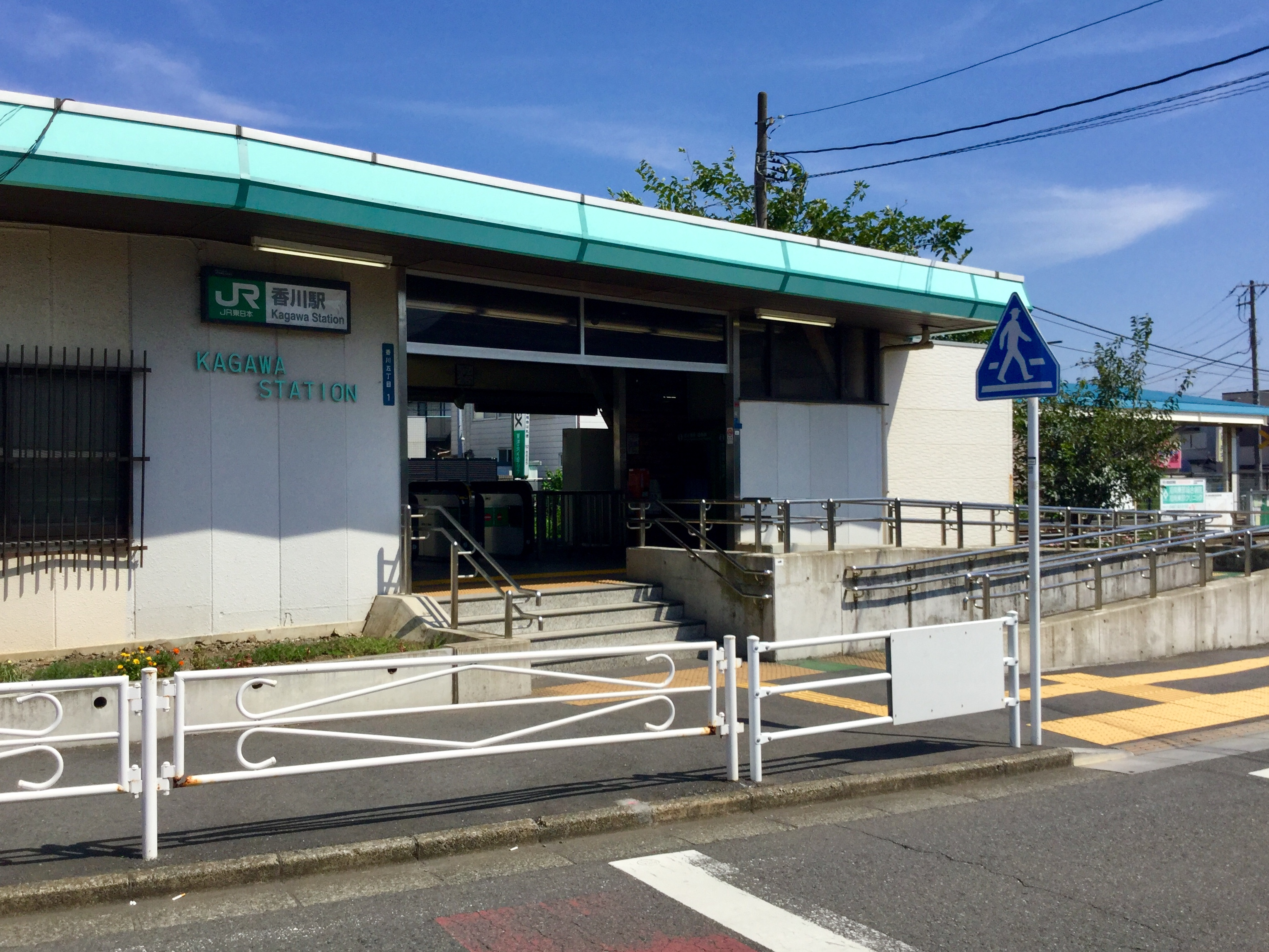 JR香川駅